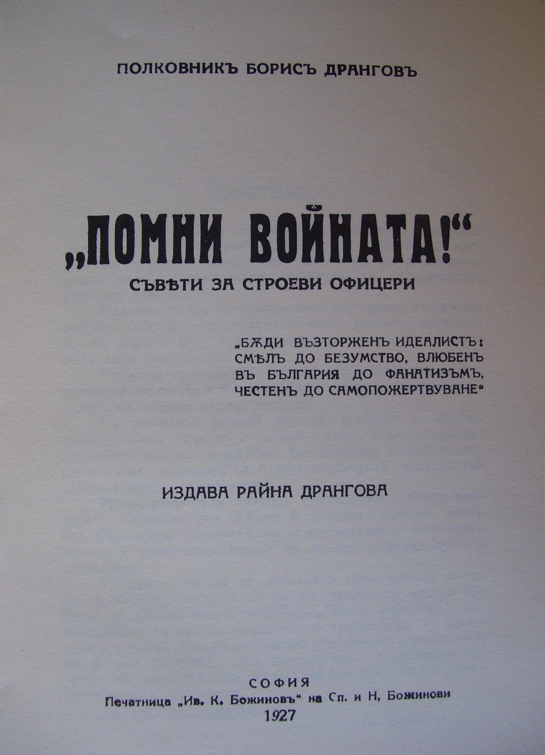 Заглавна страница на "Помни войната" на Борис Дрангов.